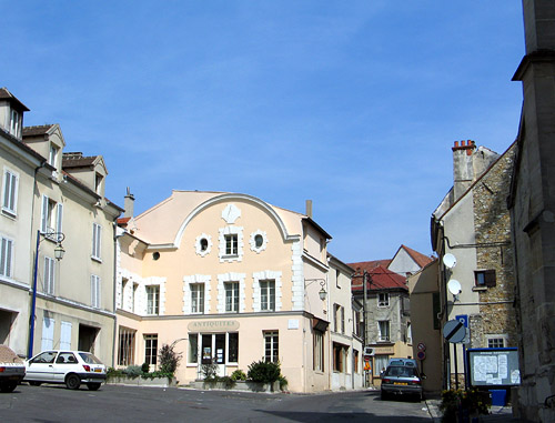 Cormeilles-en-parisis, le quartier de l'église. 2004 Jean-noël Lafargue